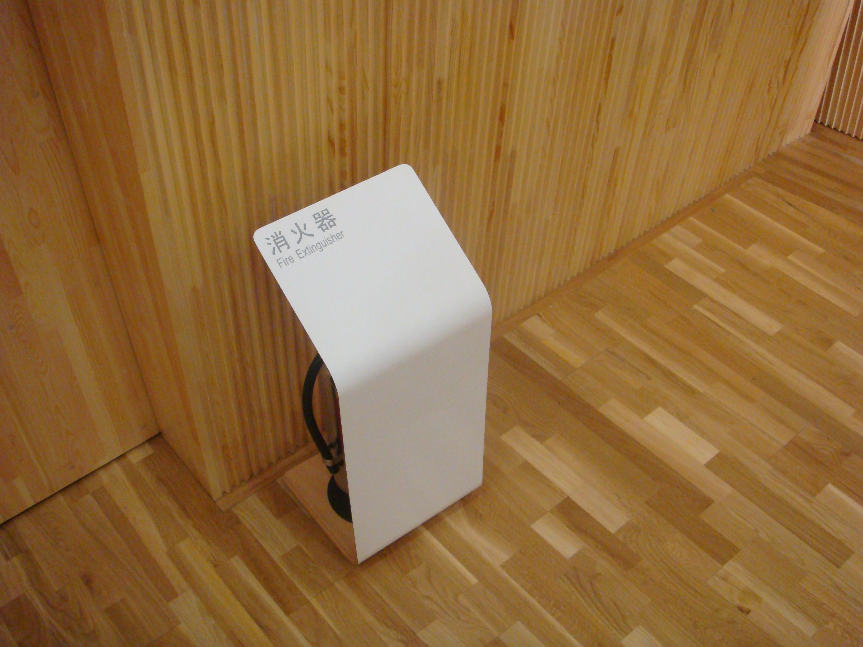 福武ホールの消火器